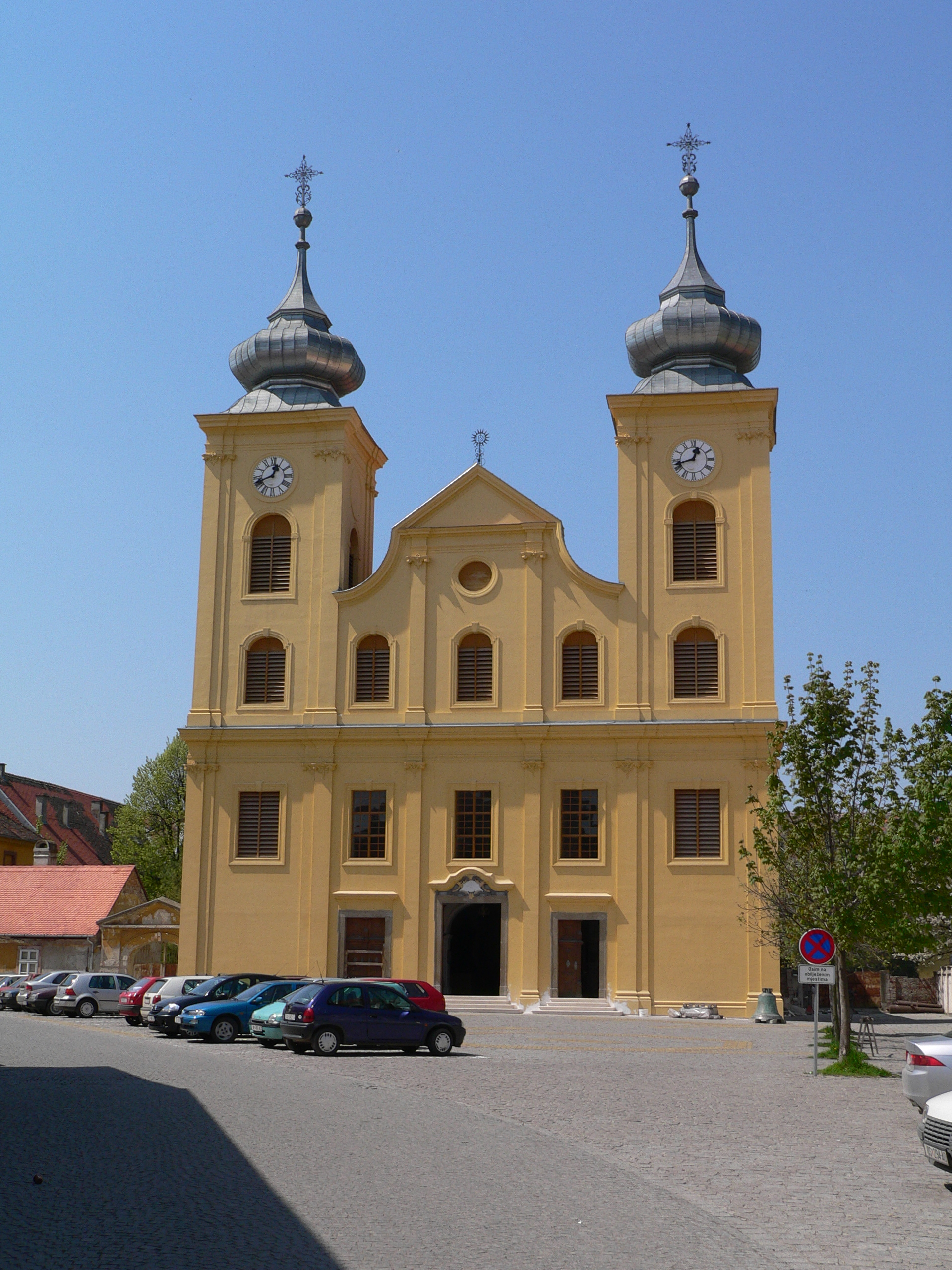 St. Michael's Church, Tvrđa, Osijek